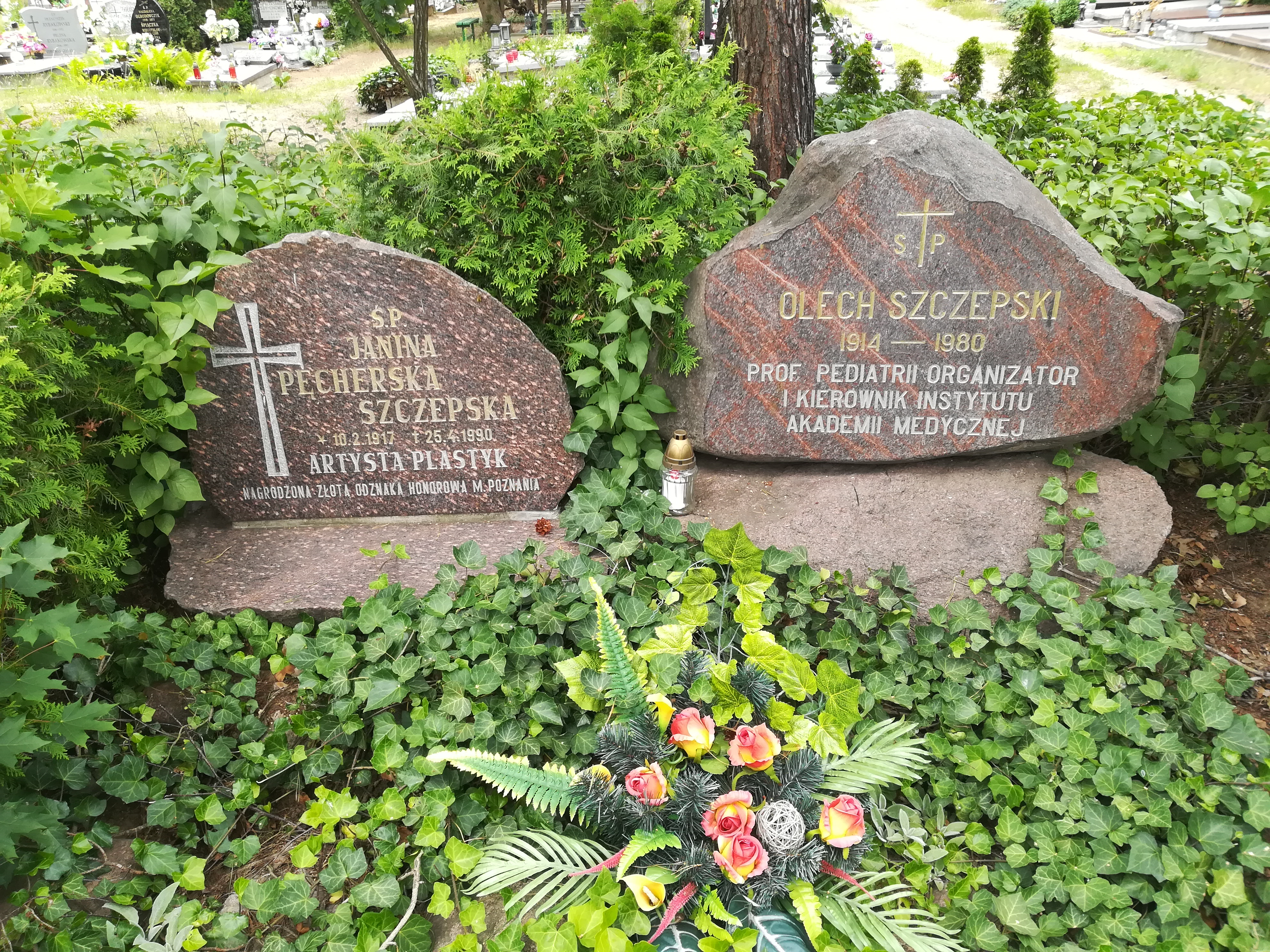 Grób Szczepskich na cm. junikowskim w Poznaniu.